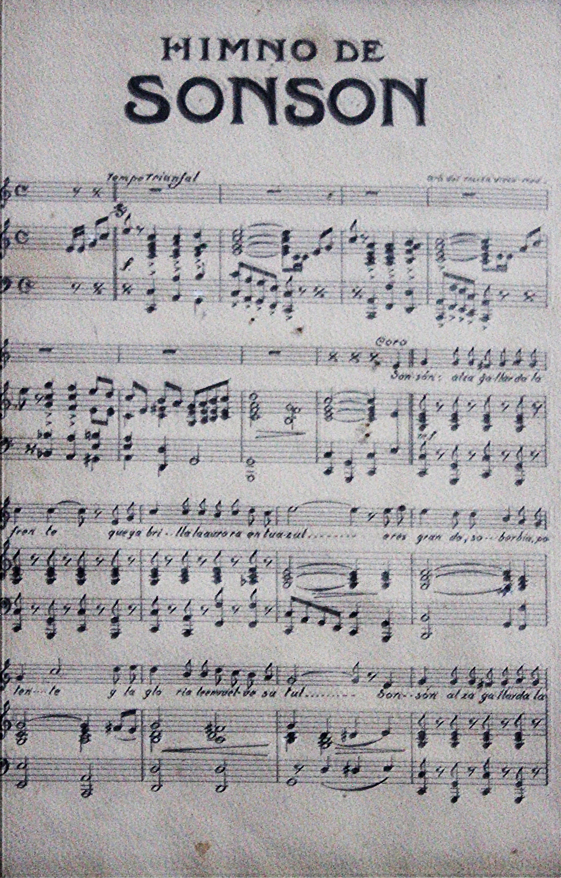 Primera página de la partitura del Himno de Sonsón exhibida en el museo Casa de los Abuelos. Sonsón, Colombia.